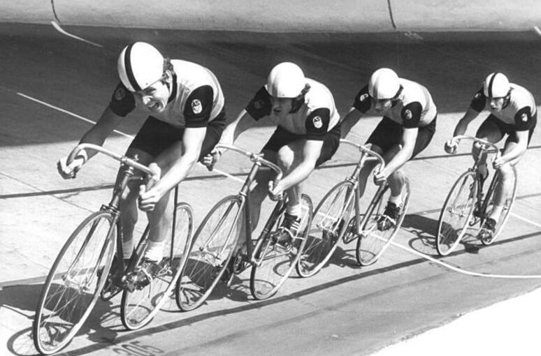 D. Pohl, N. Dürpisch, H.-J. Pohl, F. Müller ADN-ZB Gahlbeck 3.7.78 Leipzig: DDR-Meisterschaften im Bahnradsport - Neuer Titelträger im 4000-m-Mannschaftsverfolgungsfahren wurde am 2.7. der ASK Vorwärts Frankfurt-Oder. Im Finale gegen die Vertretung des SC Karl-Marx-Stadt kämpfen die Frankfurter Diermar Pohl, Norbert Dürpisch, Hans-Joachim Pohl und Fred Müller (v.l.).